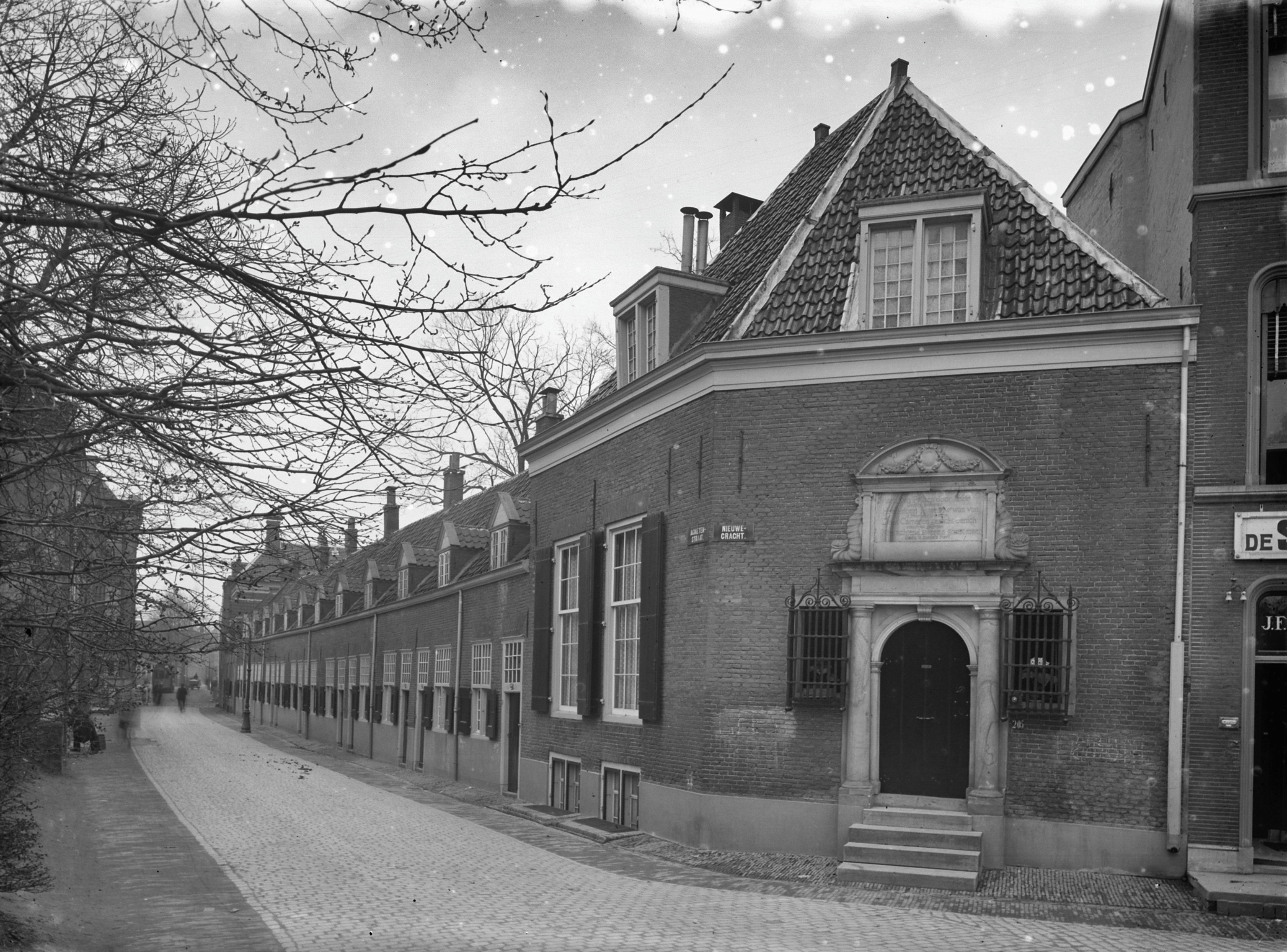 Stichting Pallaes: Agnietenstraat hoek Nieuwe Gracht naar het noord-westen